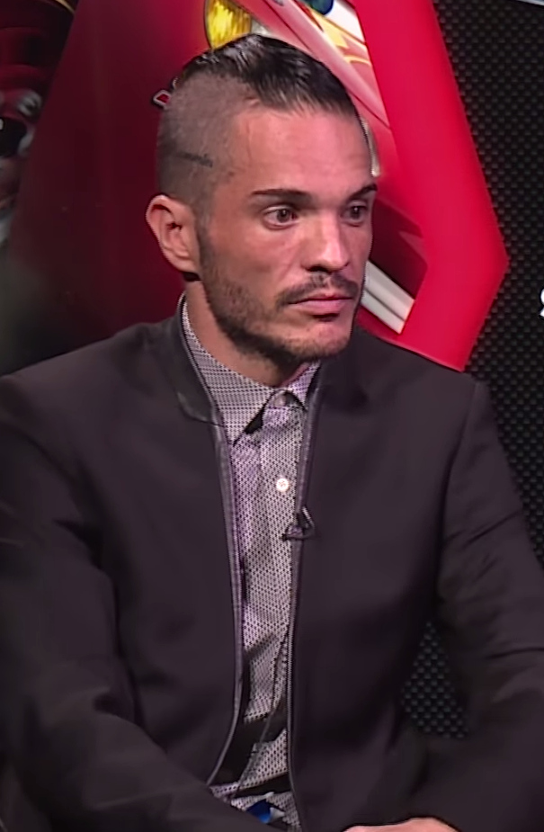 Kuno Becker y Verónica Jaspeado hablan sobre "Cars 3"